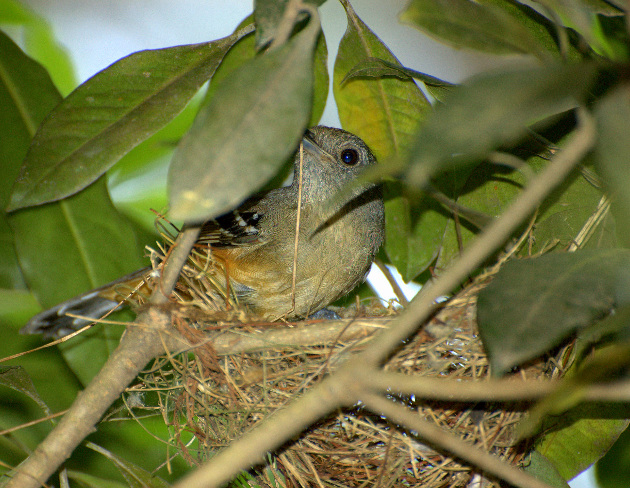 Variable Antshrike (Thamnophilus caerulescens) Horto Florestal de São Paulo